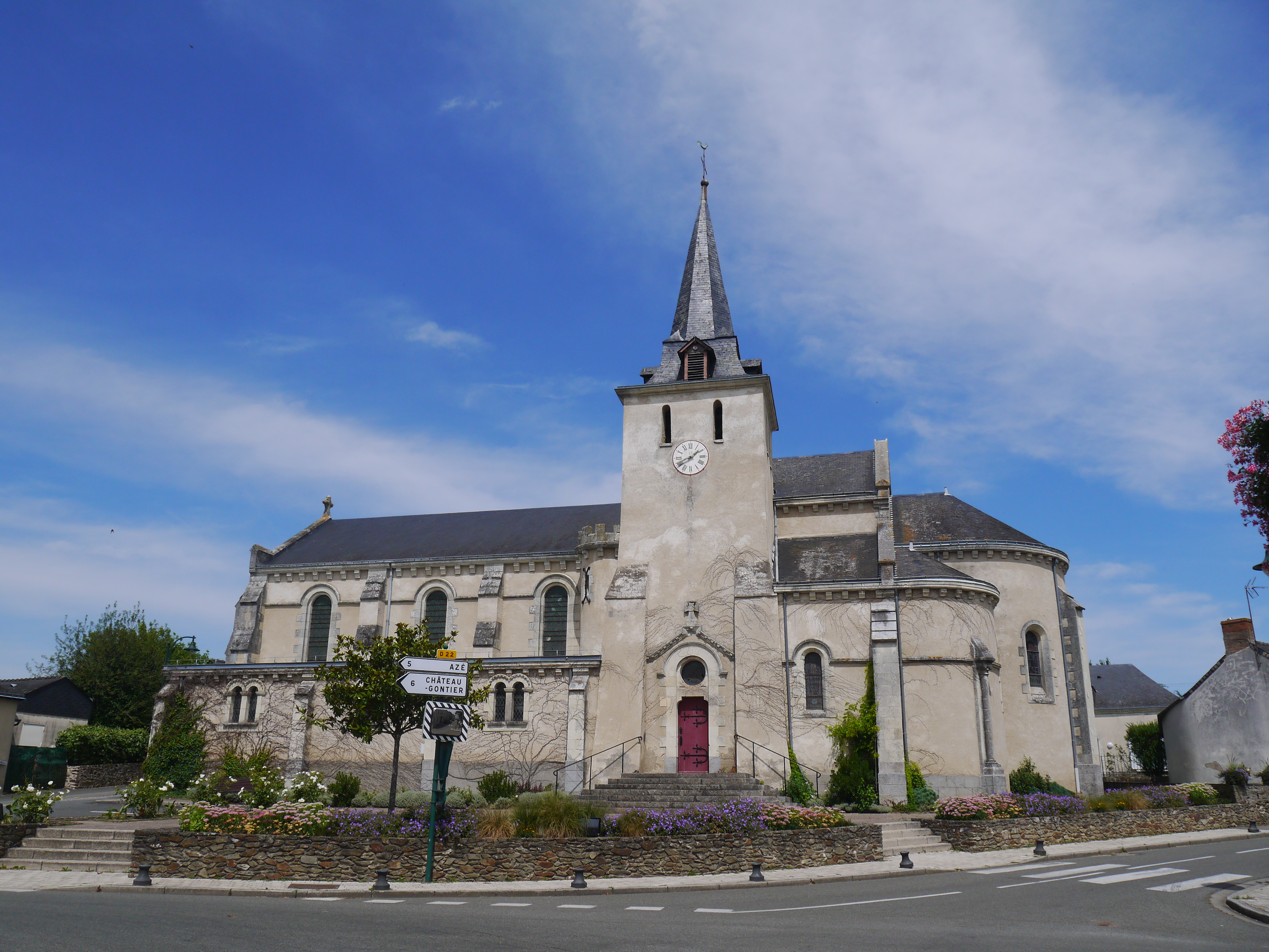 L'église Saint-Julien-le-Martyr.